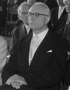 im Emil-Lang-Hörsaal der Christian-Albrechts-Universität (CAU). Im Bild der Gründungsdirektor des Instituts für Phytomedizin an der Landwirtschaftlichen Hochschule Hohenheim Prof. Dr. Dr. Dr. Bernhrd Rademacher (2.v.r.) und der französische Landwirtschaftsingenieur Bernard Poullain (4.v.r.) aus La Queue-lez-Yveslines.